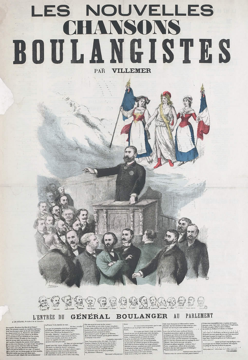 Les nouvelles chansons boulangistes. Lithographie coloriée. 93,8 cm x 80 cm. MuCEM (Marseille). Inv. 05-509277 / 50.21.403